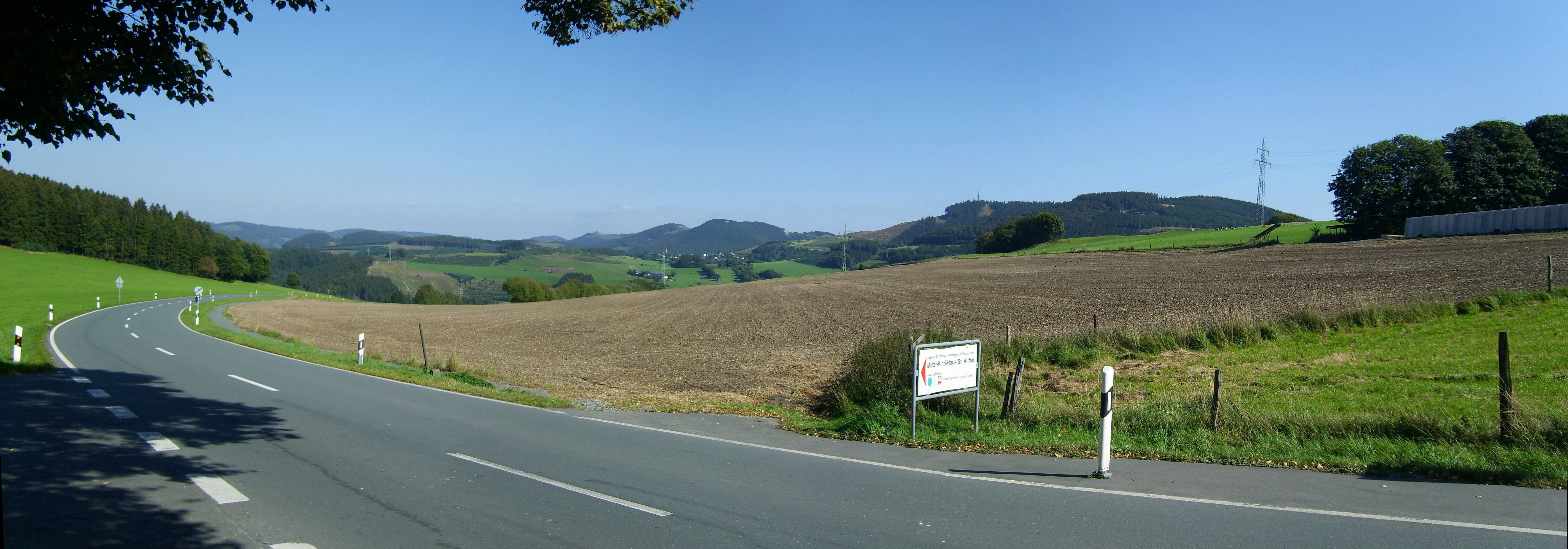 Sauerland-Landschaft östlich Berlars mit den Ramsbecker Rücken (ab dem Olsberg): Windsberg (584 m) Langer Berg (554 m) Eisenberg (606 m) Borberg (670 m) Olsberg (704 m) Schmalenberg (714 m) Ohlenkopf (729 m; davor Andreasberg) Wiedegge (732 m) Stüppel (732 m) Dörnberg (691 m) Vgl. auch Deutschle-Panoramen. This panoramic image was created with Autostitch. Stitched images may differ from reality.